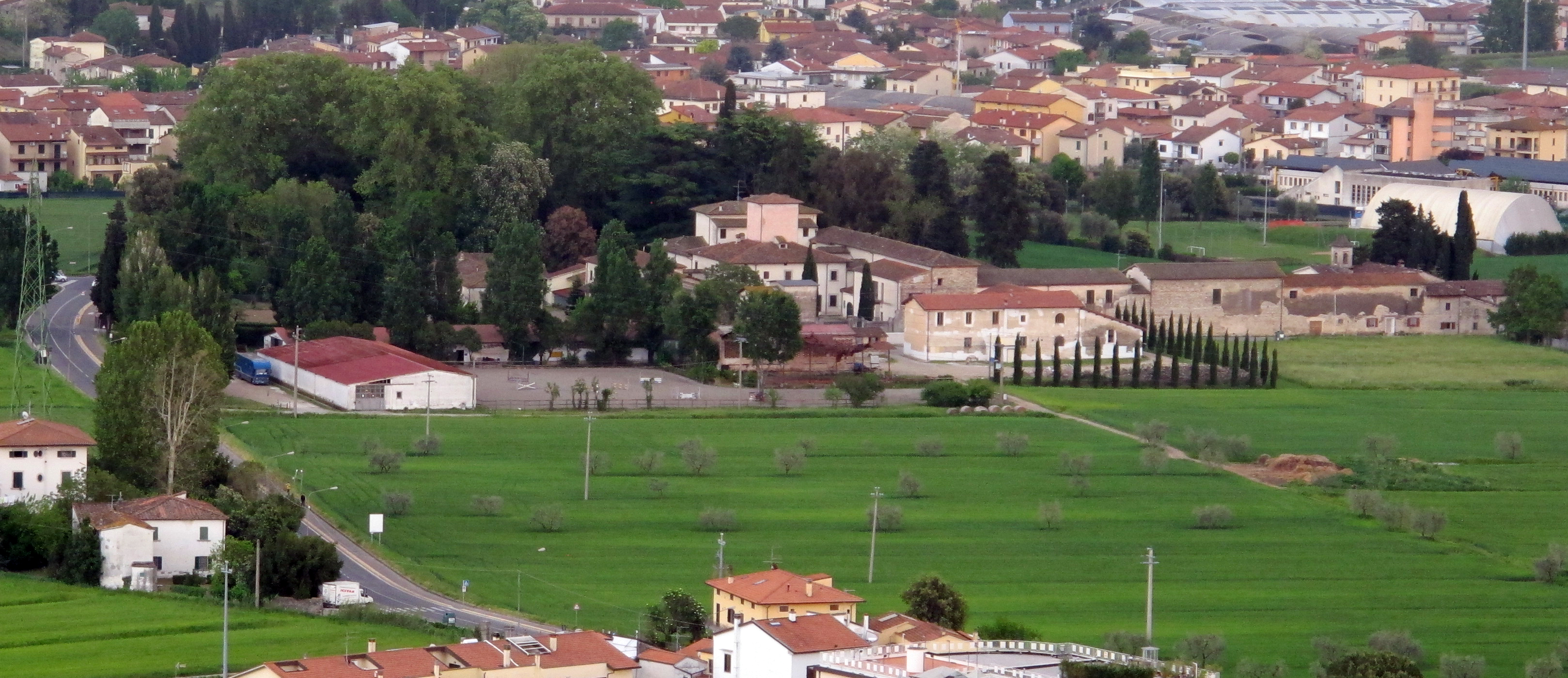 Montemurlo